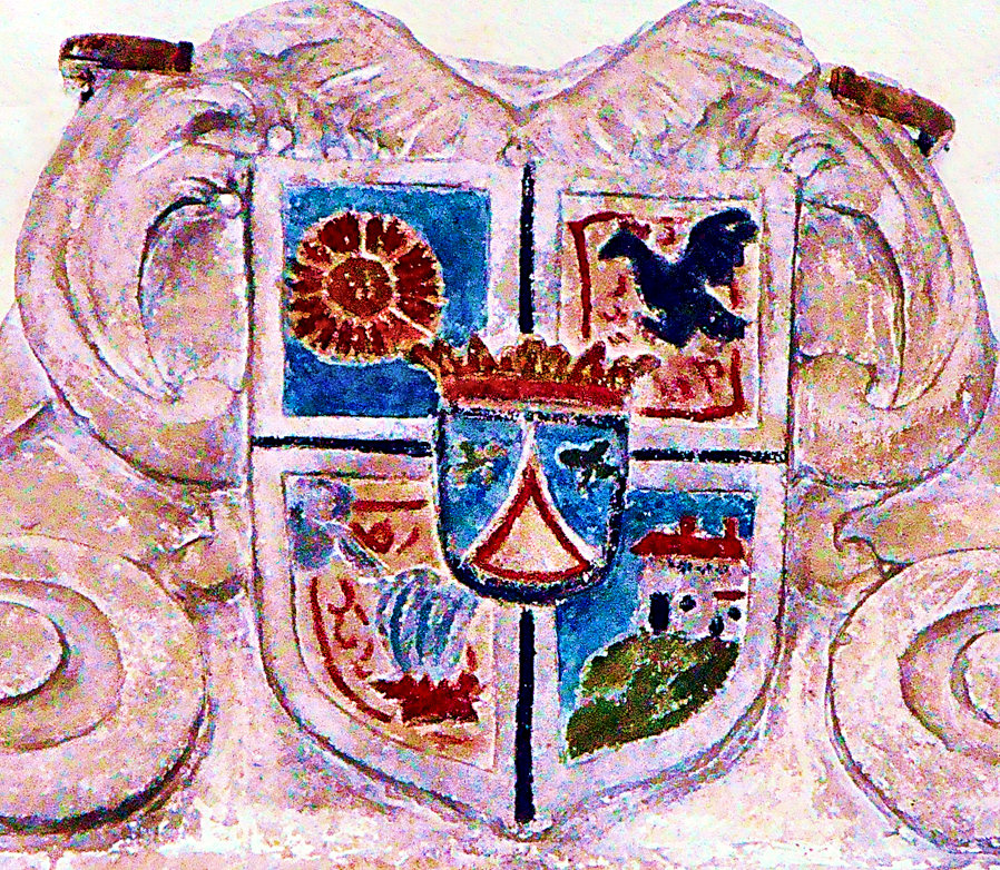 Wappen Albrecht von Albrechtsburg auf dem Epitaph des Probstes Conrad Ferdinand in Eggenburg 1730